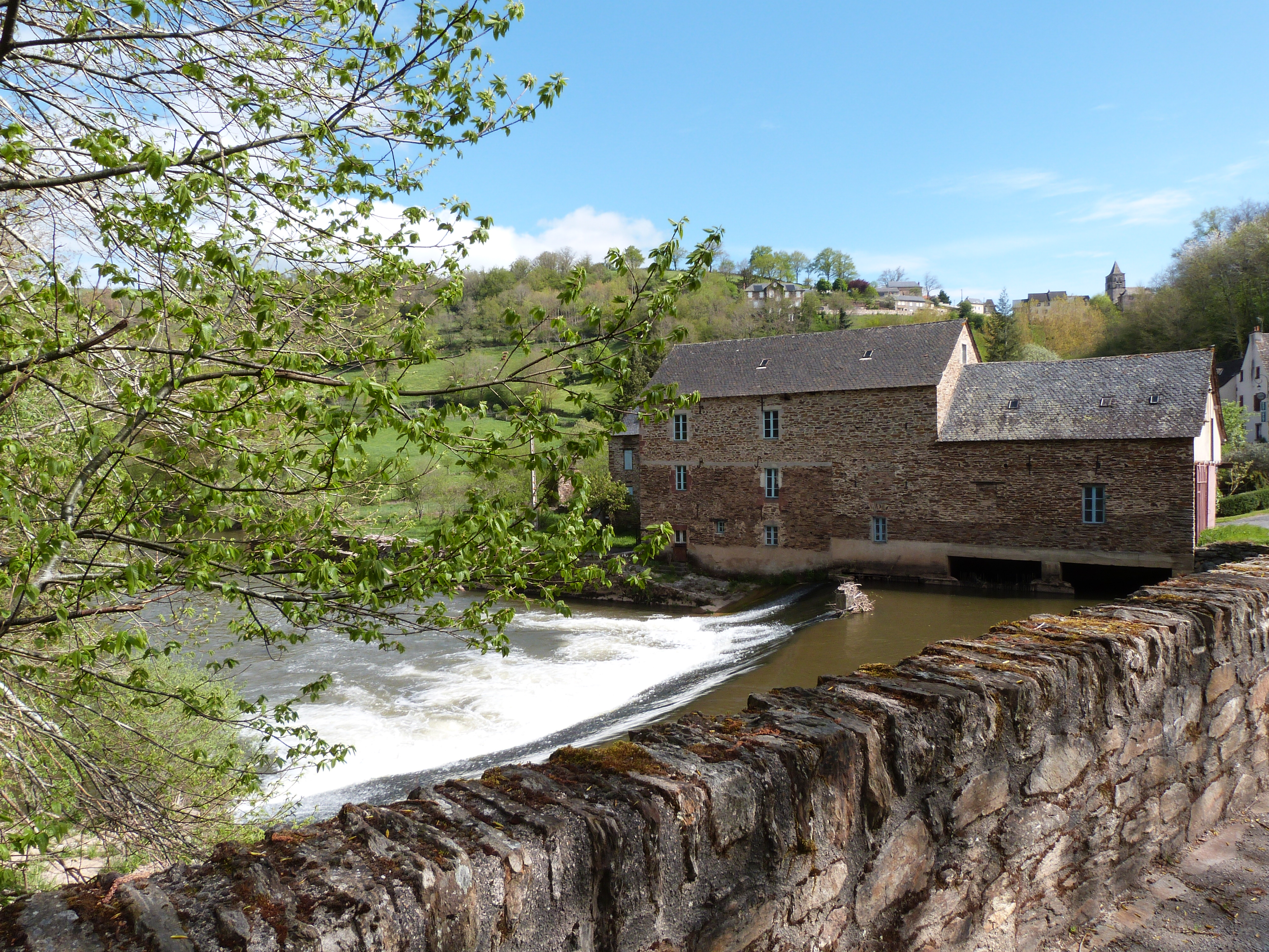 Vue du pont sur l'Aveyron du moulin situé au lieu-dit les Planques